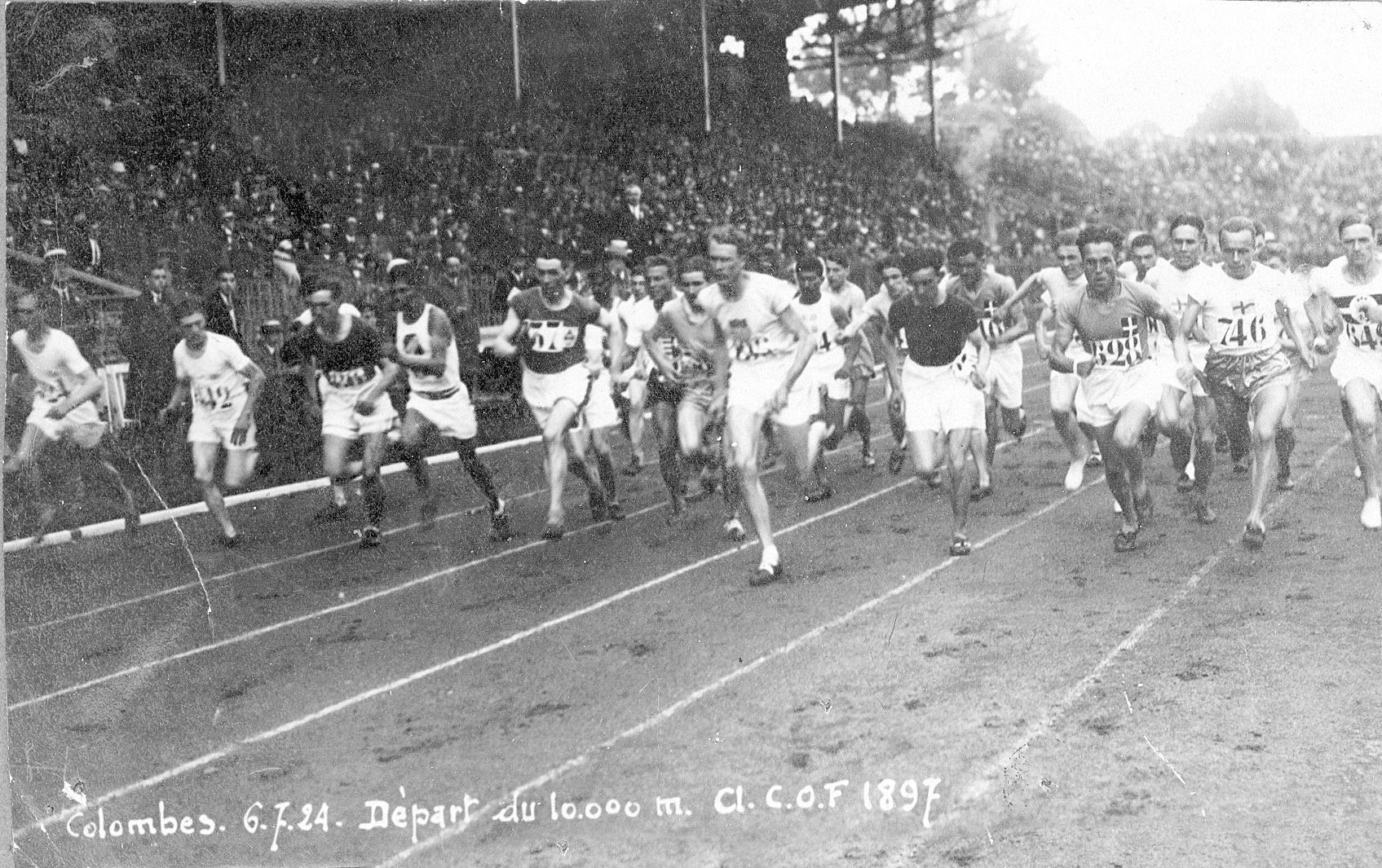 La partenza dei 10000 metri piani ai Giochi olimpici di Parigi 1924. La gara si tenne presso lo Stade olympique Yves-du-Manoir di Colombes, vicino a Parigi. L'atleta con il pettorale numero 628 è Carlo Speroni